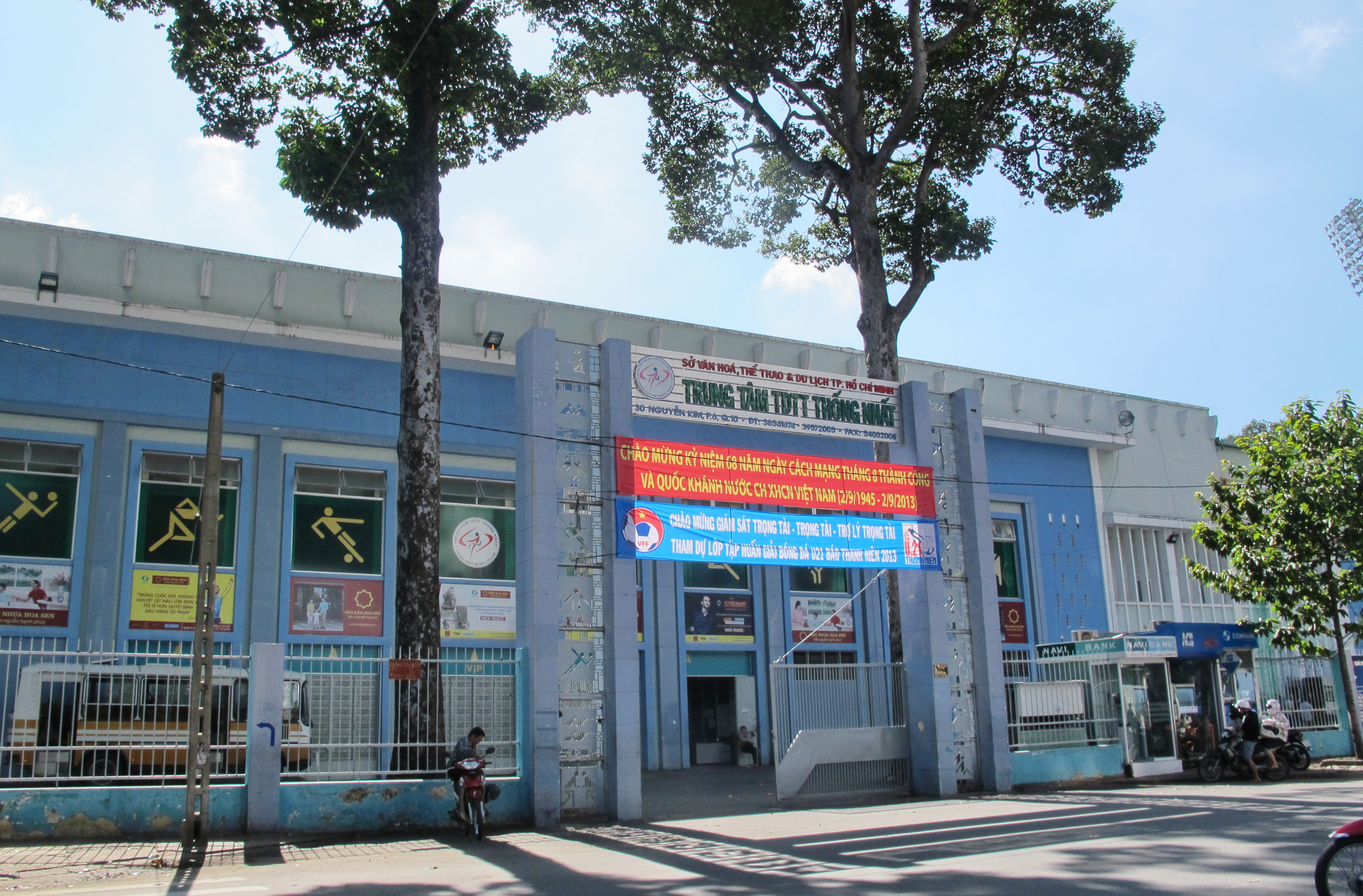 Sân vận Động thống Nhất, tpHcmvn, quan 10